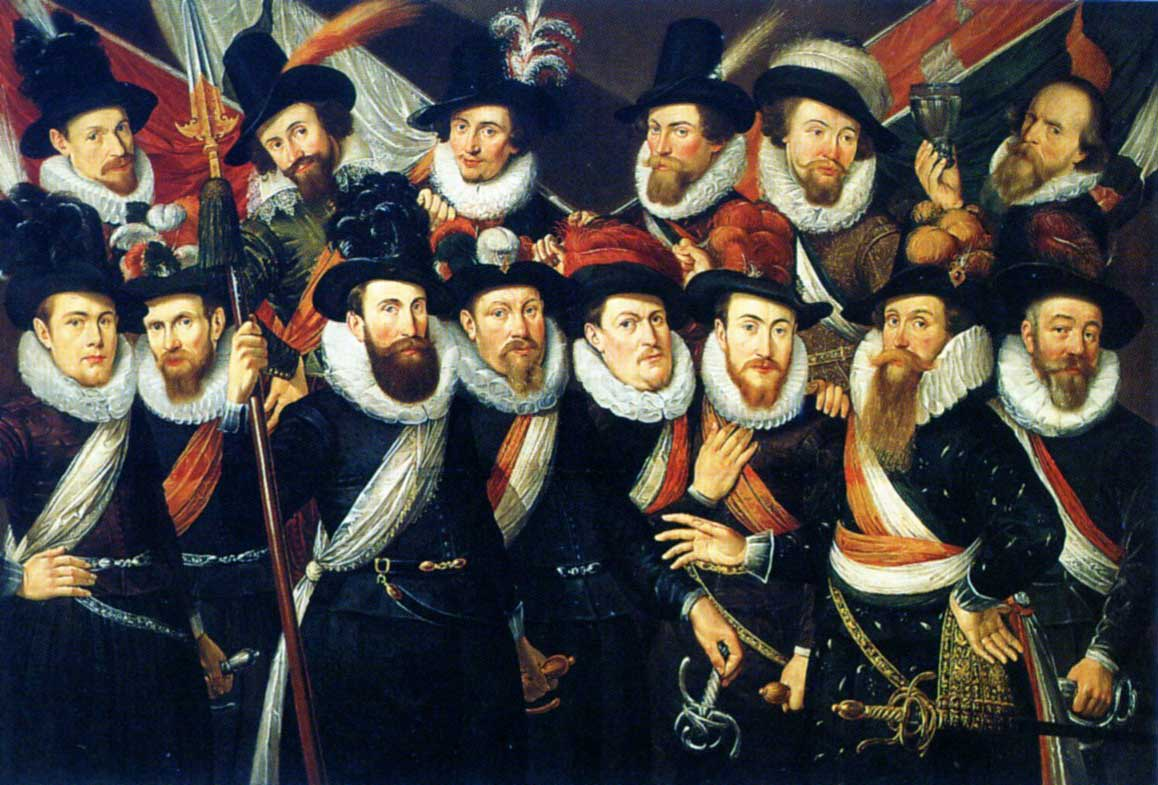 Officieren van de schutterij o.l.v. kolonel Gijsbert Hendricksz. 't Hart